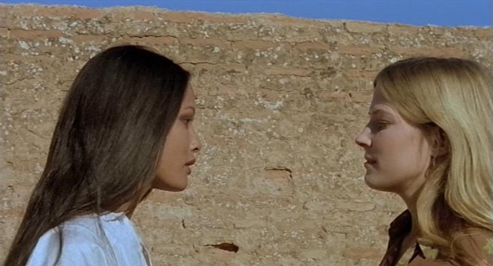 Screenshot del film Emanuelle nera - Orient Reportage, diretto da Joe D'Amato nel 1975